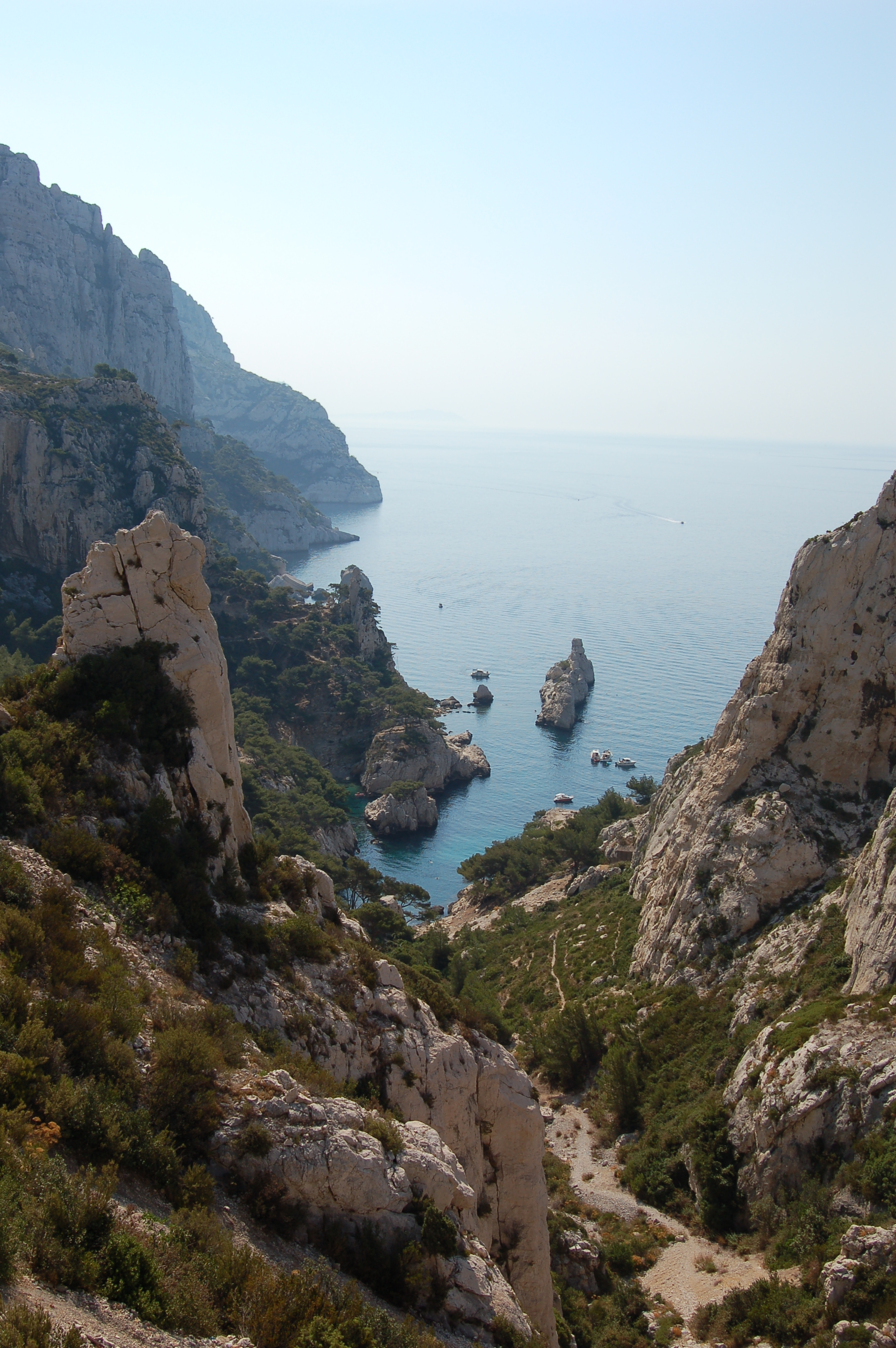 Calanque de Sugitton